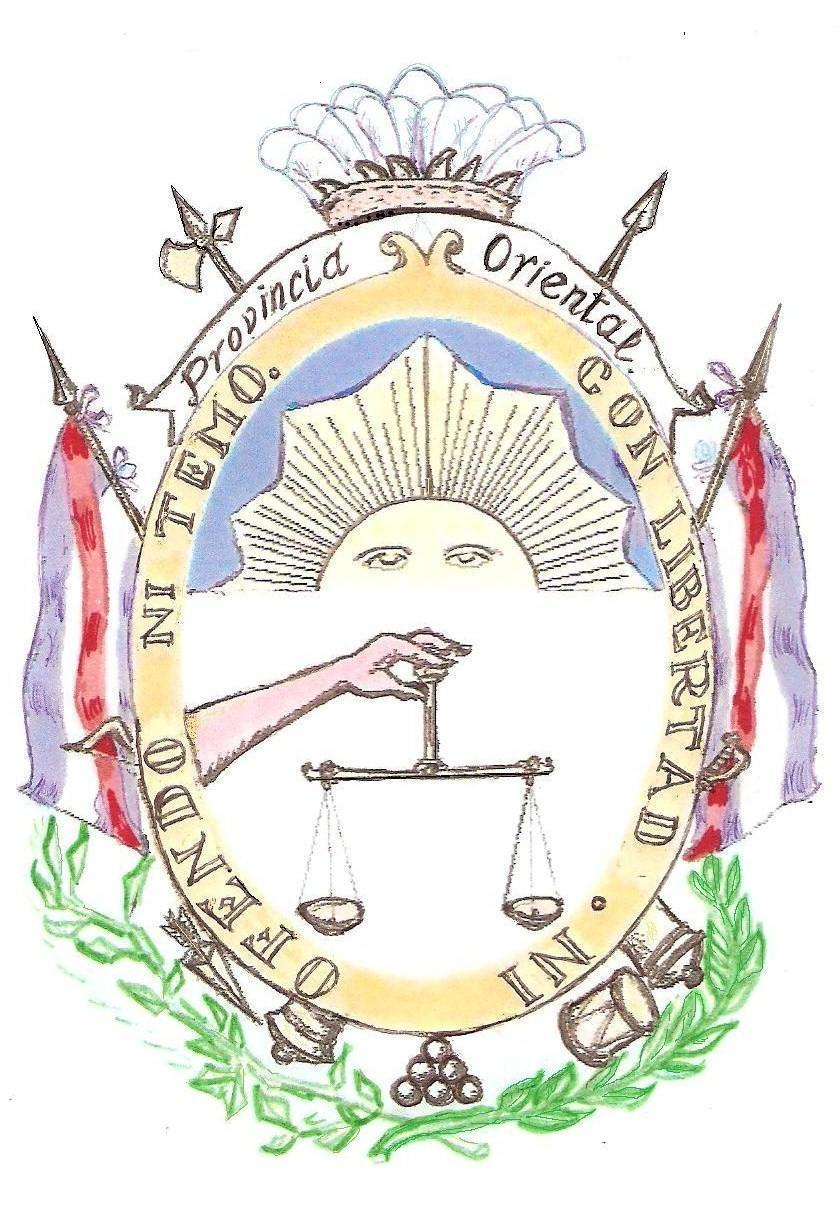 Paint